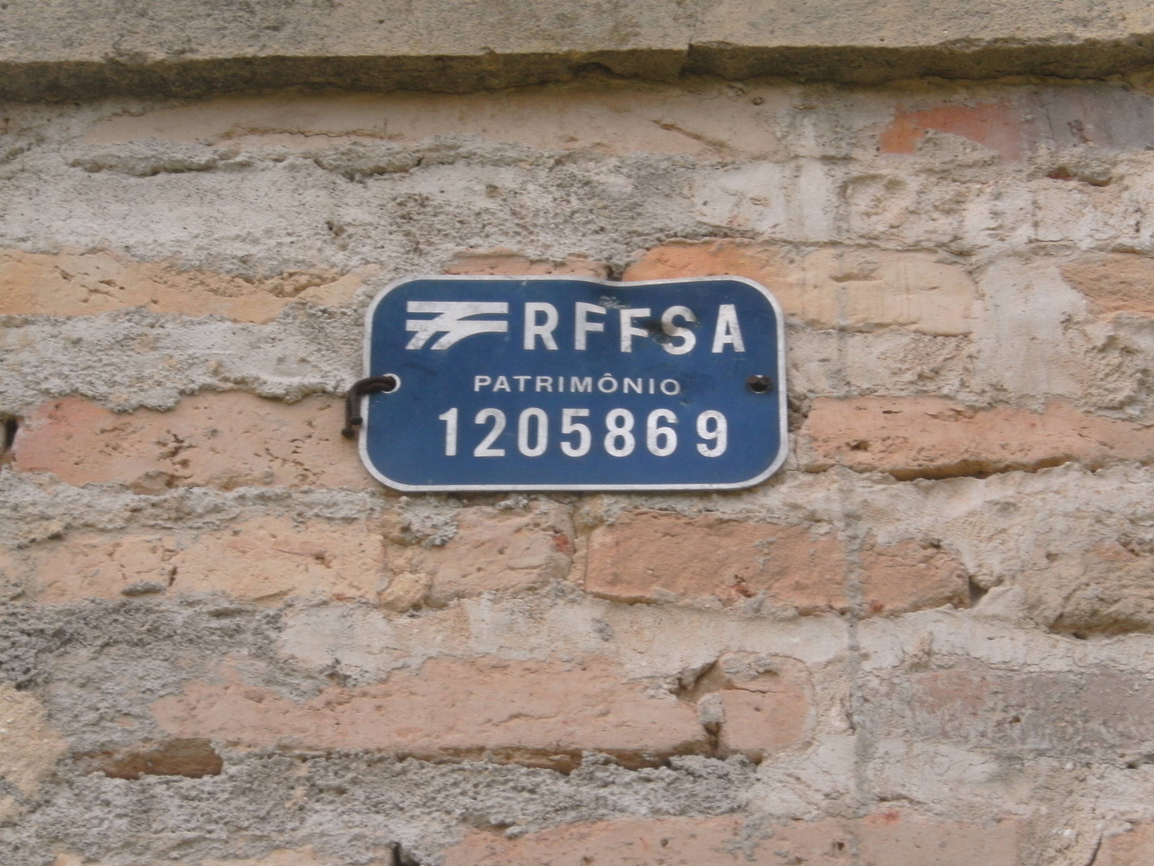 Placa da RFFSA em uma instalação predial funcional no lugar Miradouro em Campo Maior-PI.